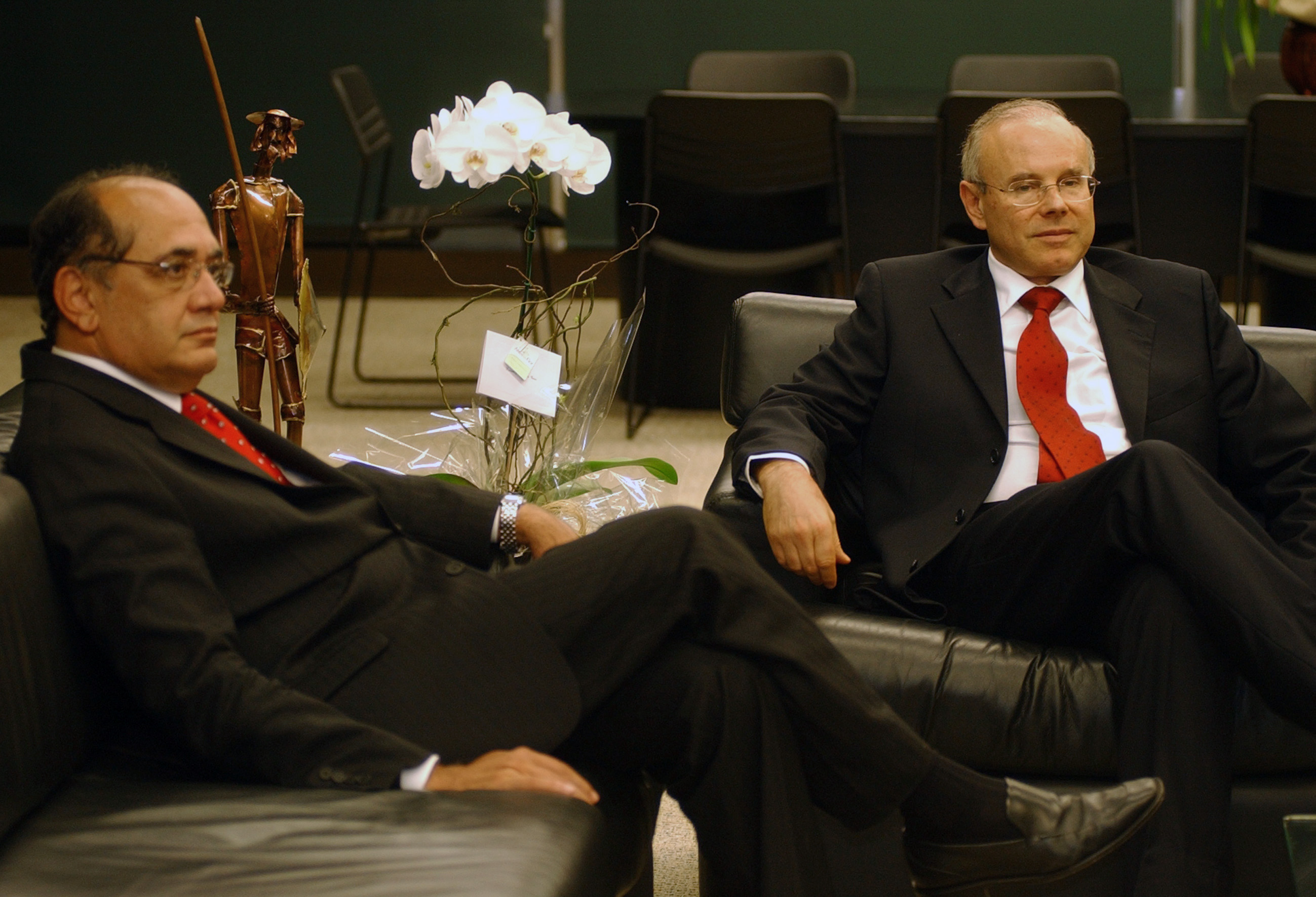 Brasília - O presidente do Supremo Tribunal Federal - STF, ministro Gilmar Mendes, recebe em audiência o ministro da Fazenda, Guido Mantega.